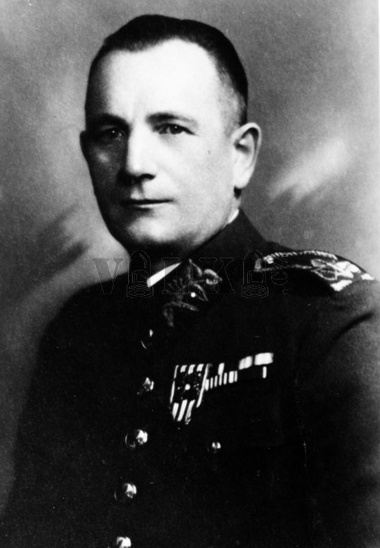 František Horáček, československý voják, brigádní generál